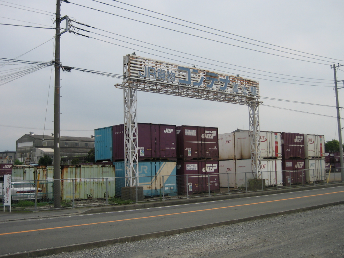 JR貨物富士駅コンテナヤード